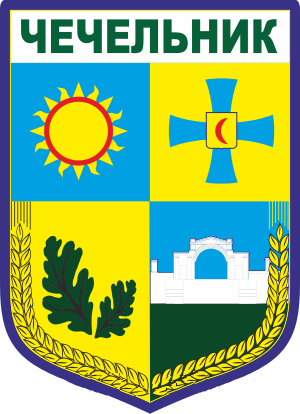 Герб Чечельника